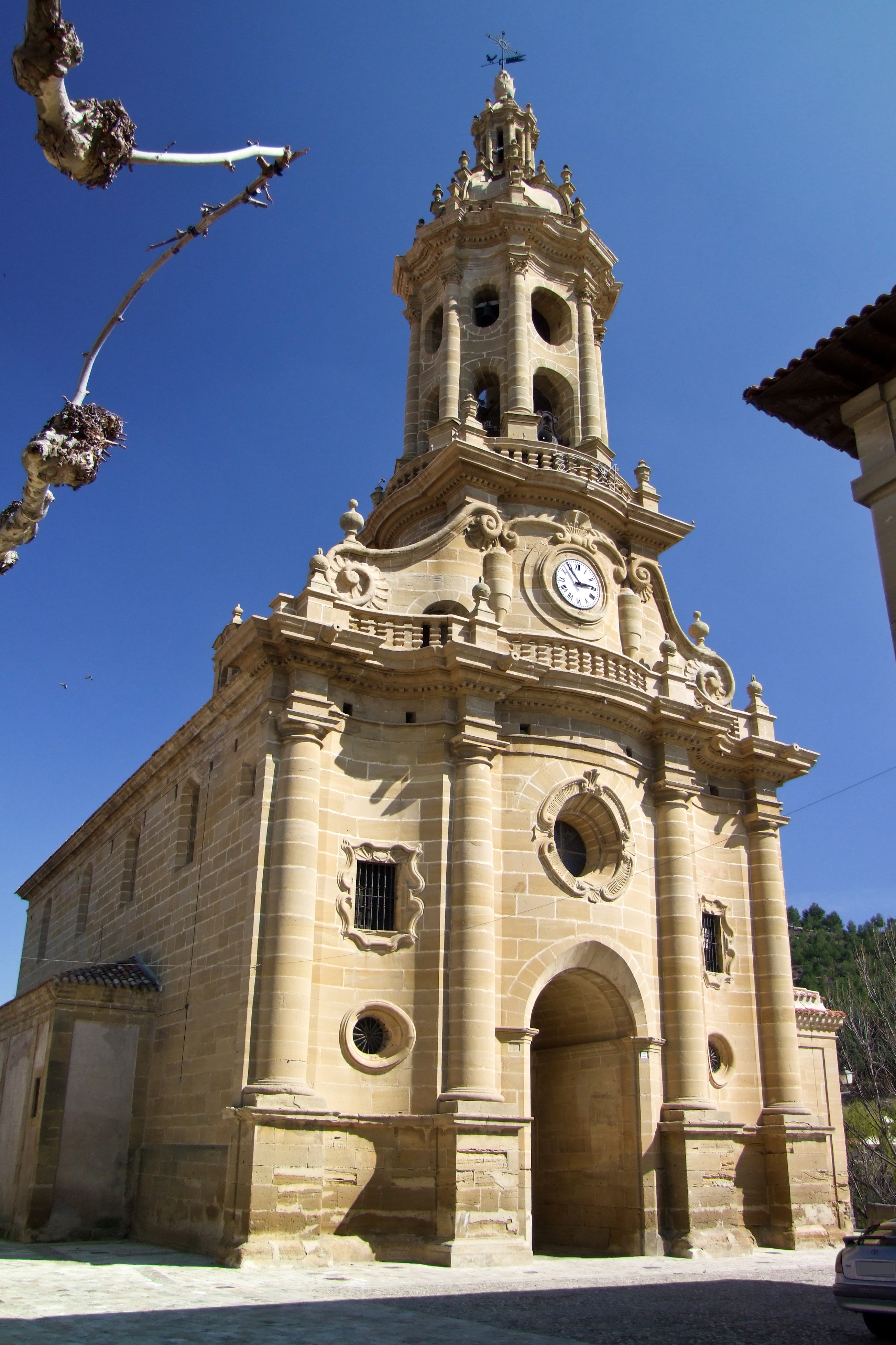 Iglesia de San Miguel en la localidad de Cuzcurrita de Río Tirón, La Rioja - España